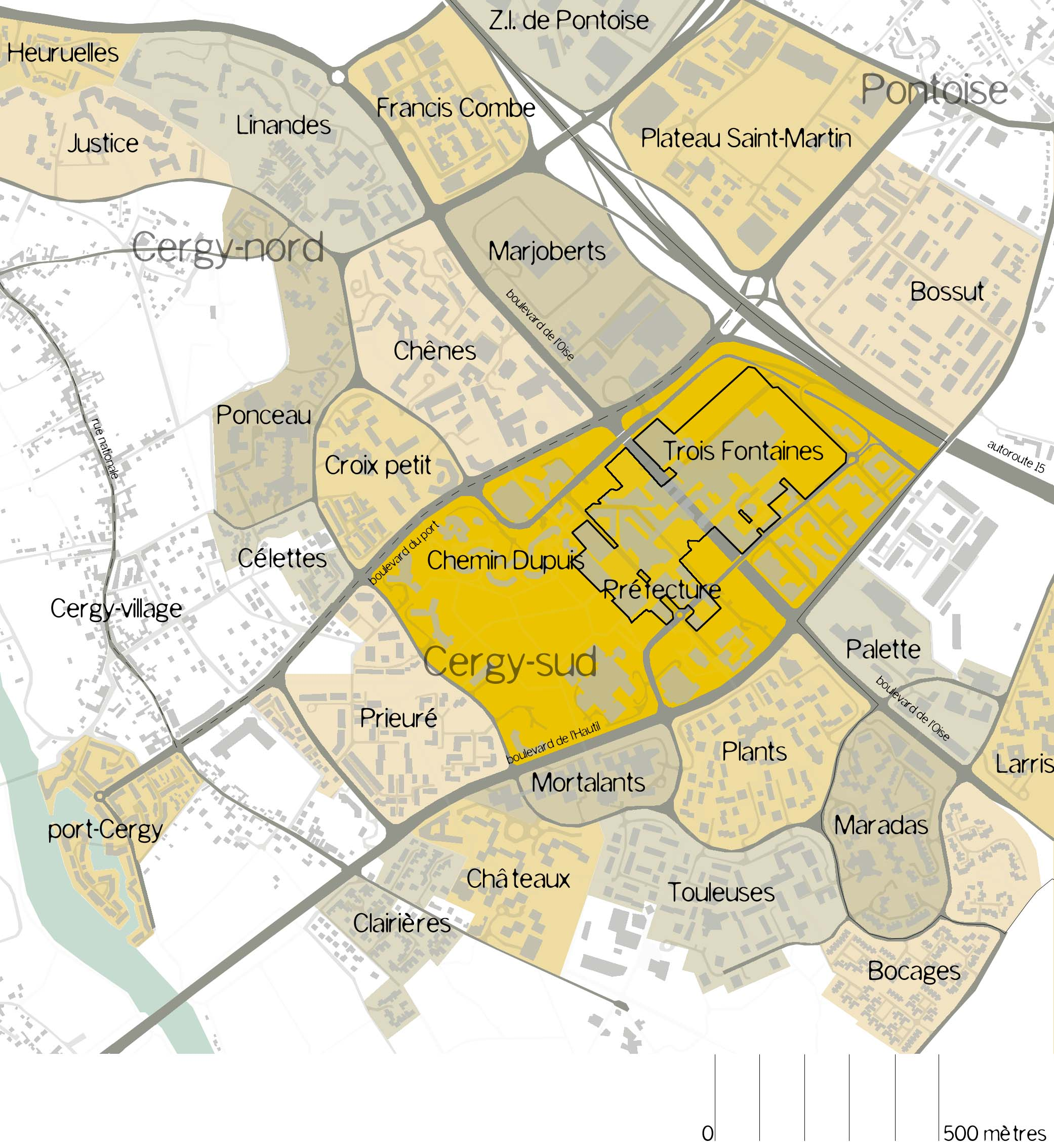 Les différents quartier de Cergy-préfecture